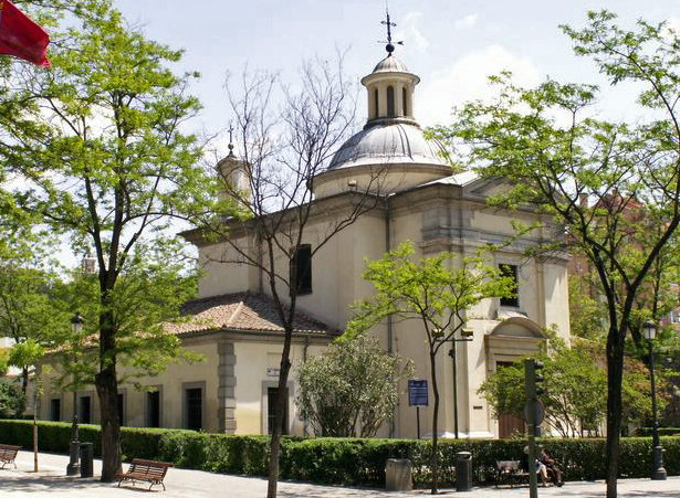 Ermita de San Antonio de La Florida, Paseo de La Florida 5. Obra de Francisco Fontana de 1792-1798. Contiene frescos de Goya en la cúpula y en las pechinas pintados en 1798. La réplica es obra de Juan Moya Idígoras realizada entre 1925 y 1928.